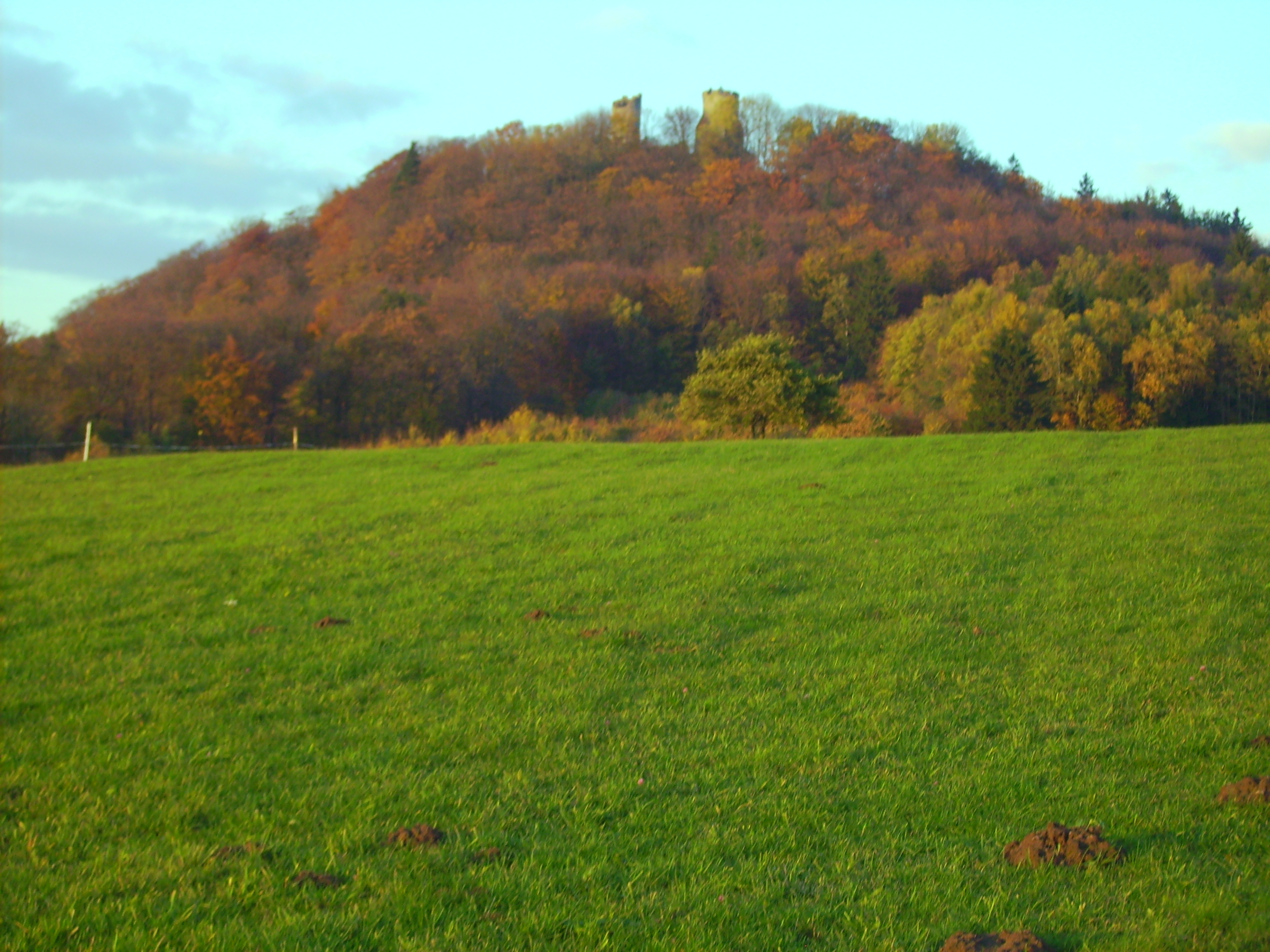 Der Berg Ebersberg in der Rhön, Kreis Fulda, Land Hessen, Gemeinde Ebersburg